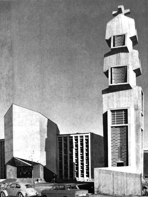 Die 2005 abgerissene Kirche St. Johannes Capistran